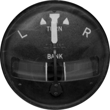 Turn and Bank Indicator, aircraft instrument, Wendezeiger